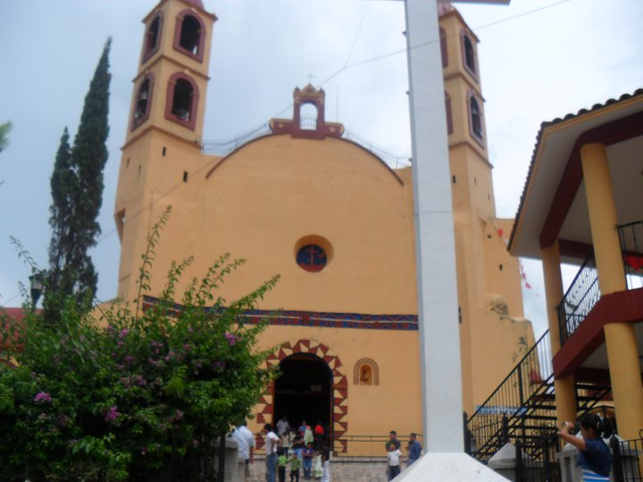 Iglesia y parte del atrio de la iglesia ubicada en el municipio de Tila, Ciapas